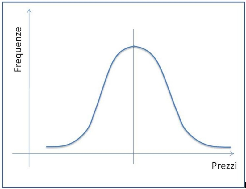 Distribuzione gaussiana di Prezzi immobiliari e relative Frequenze